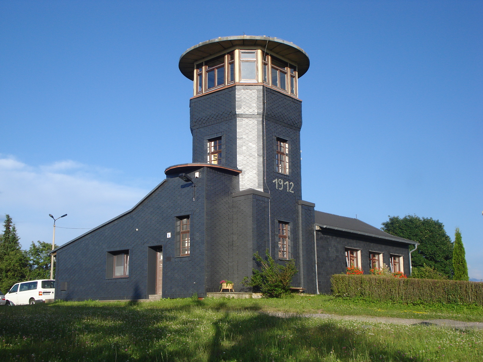 Barigauer Turm 2012